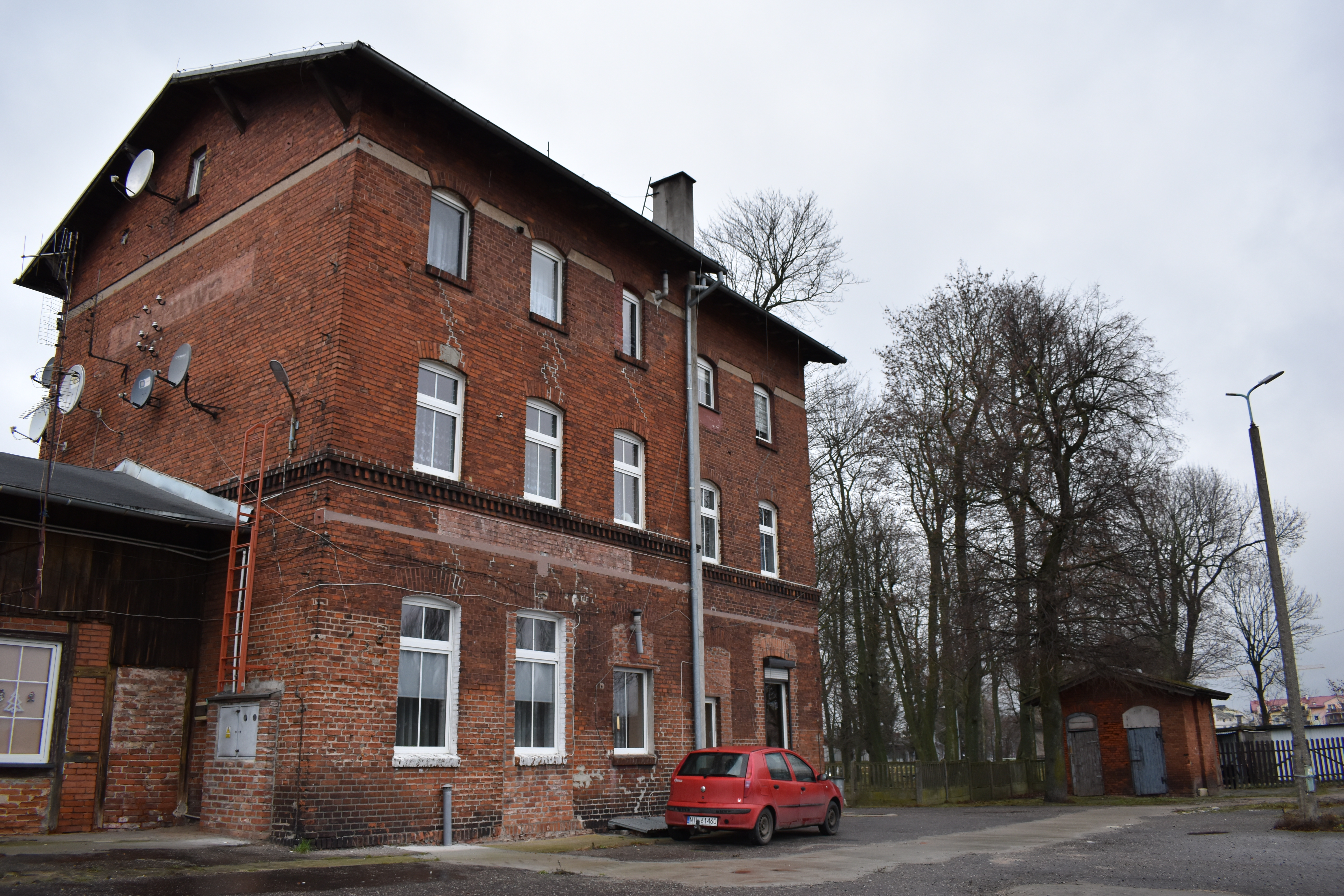 Budynek dworca w Lubawie (stan na 26.12.2019)